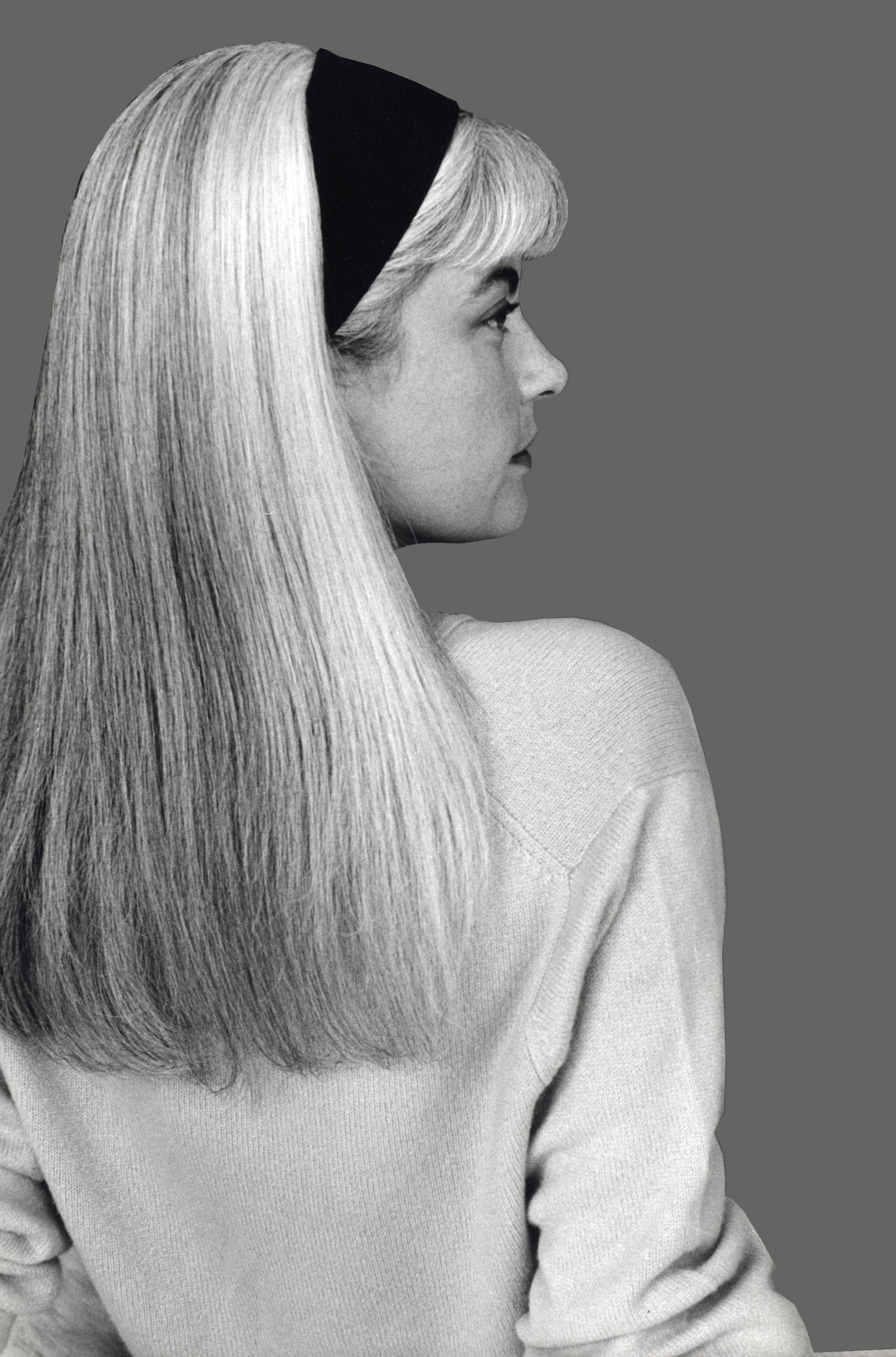 Marie Seznec Martinez